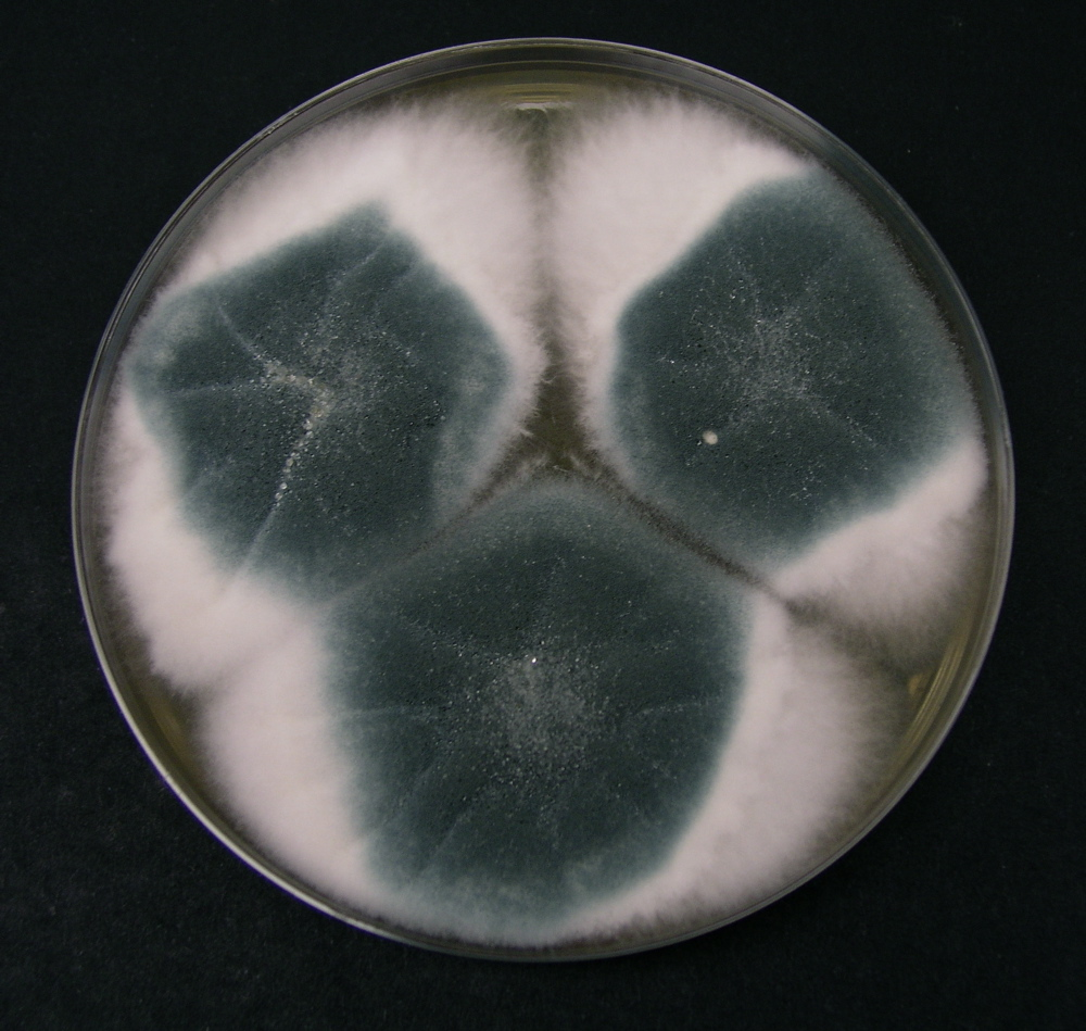 Aspergillus fumigatus from soil in culture.